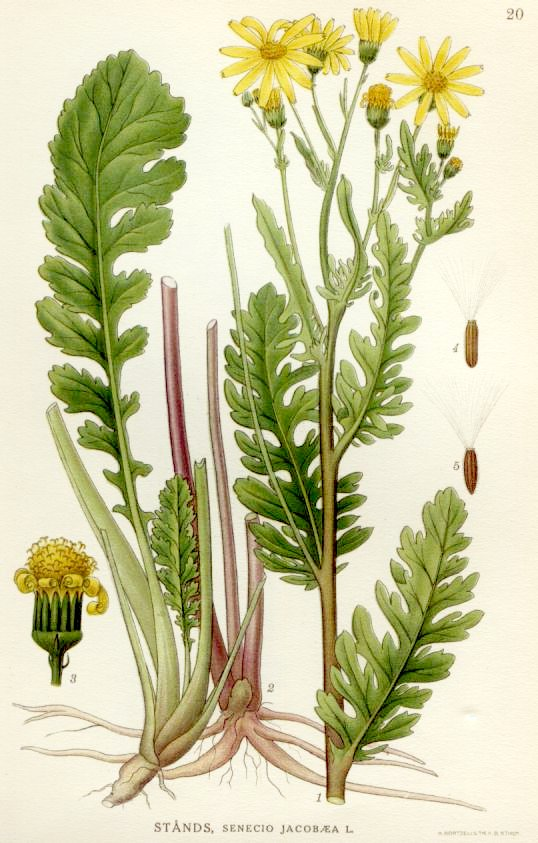 Jacobaea vulgaris 1. upper part of the plant 2. basen av tvenne stånd, av vilka det bakre är äldre och hör till det blommande exemplaret i fig. 1, det främre åter är en ungplanta med blott bladrosett 3. blomkorg (2/1) med kantblommorna mot blomningens slut tillbakarullade 4. frukt(fruit) av kantblomma (5/1) 5. frukt(fruit) av mittblomma (5/1)